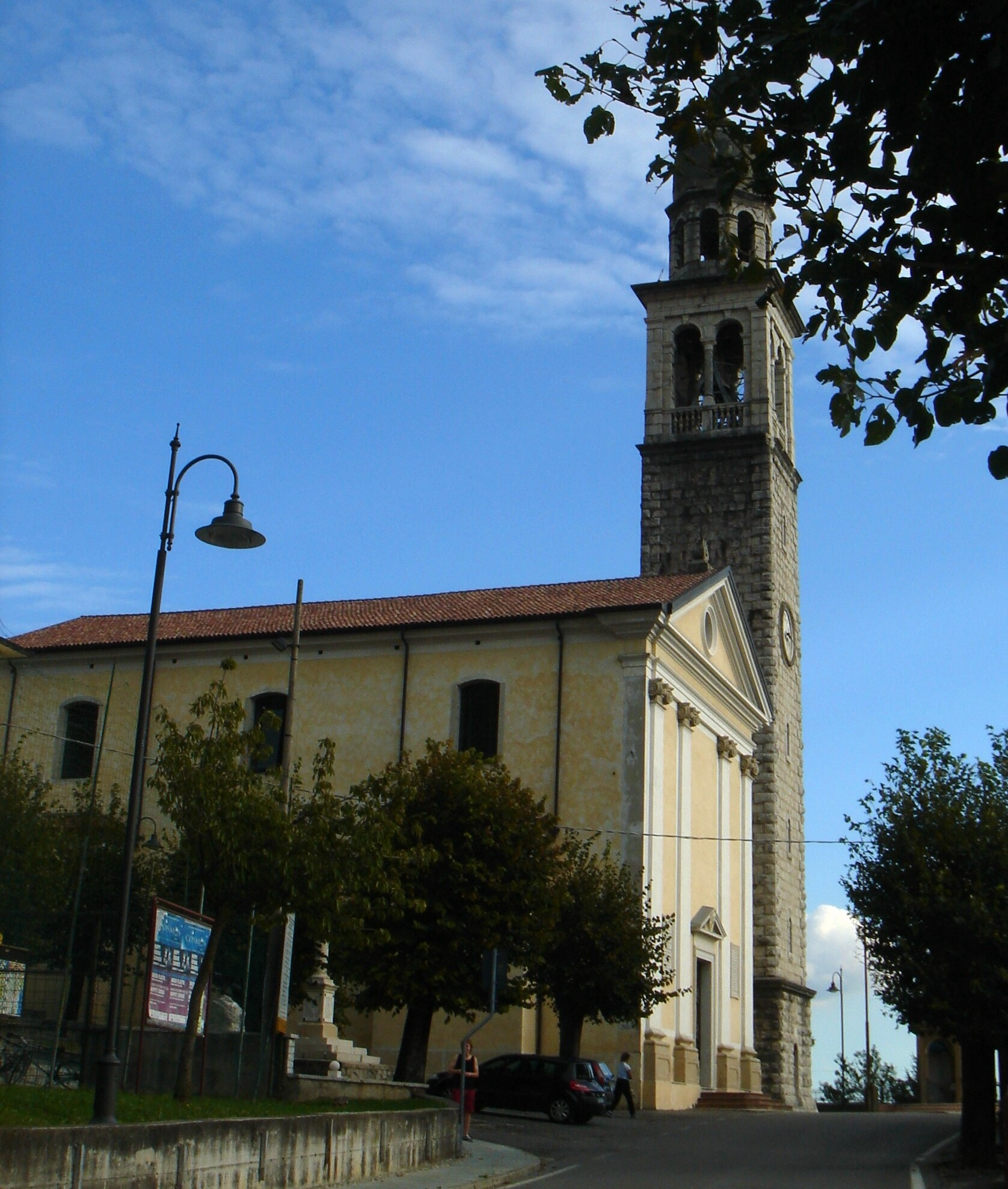 Montaner di Sarmede (Treviso): chiesa cattolica, dedicata a San Pancrazio (XIX secolo).